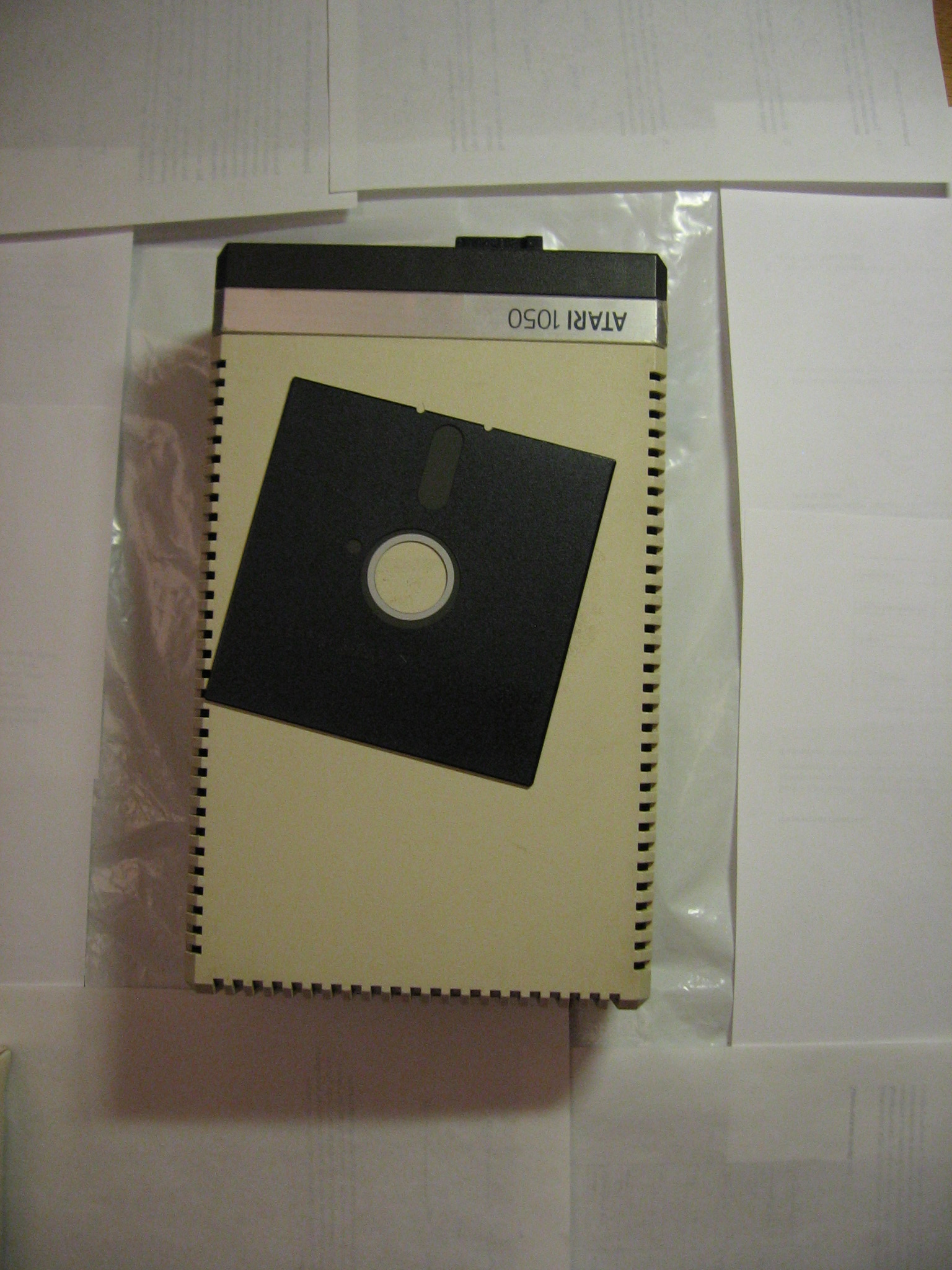 Atari 1050 - сверху